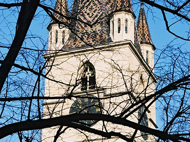 Turm der Ev. Stadtpfarrkirche in Hermannstadt